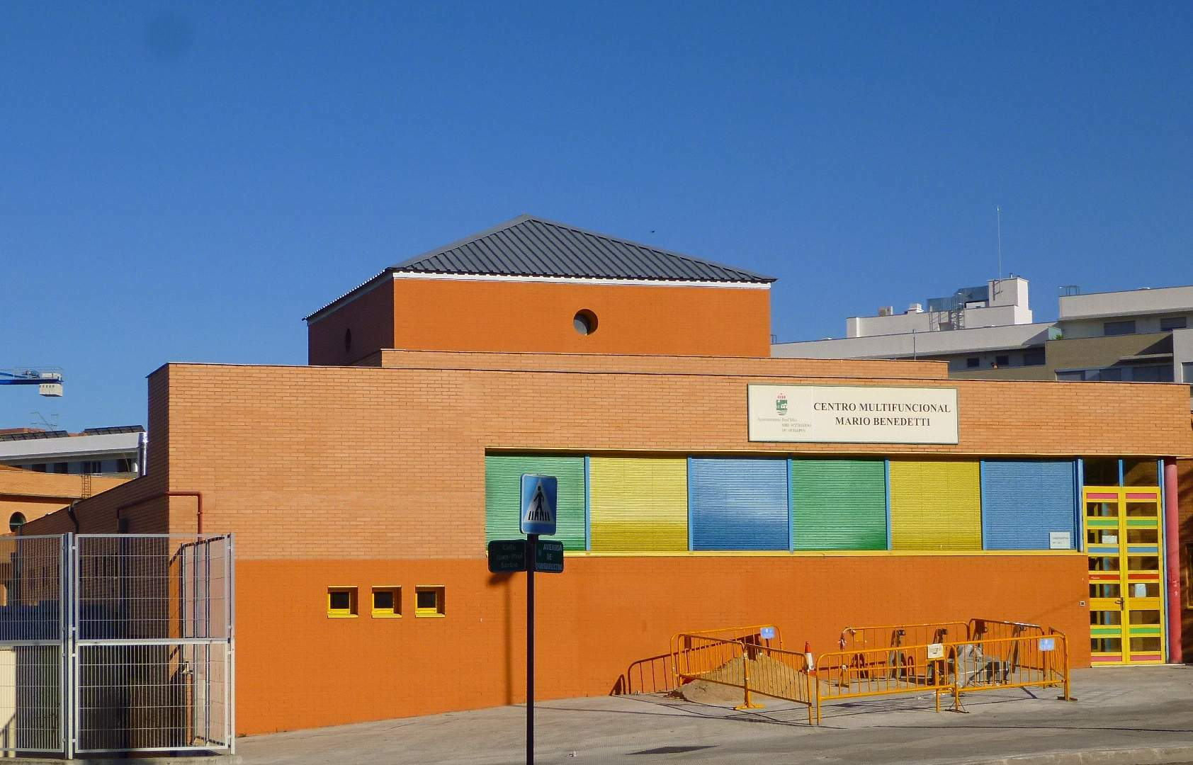 San Fernando de Henares - Centro multifuncional Mario Benedetti